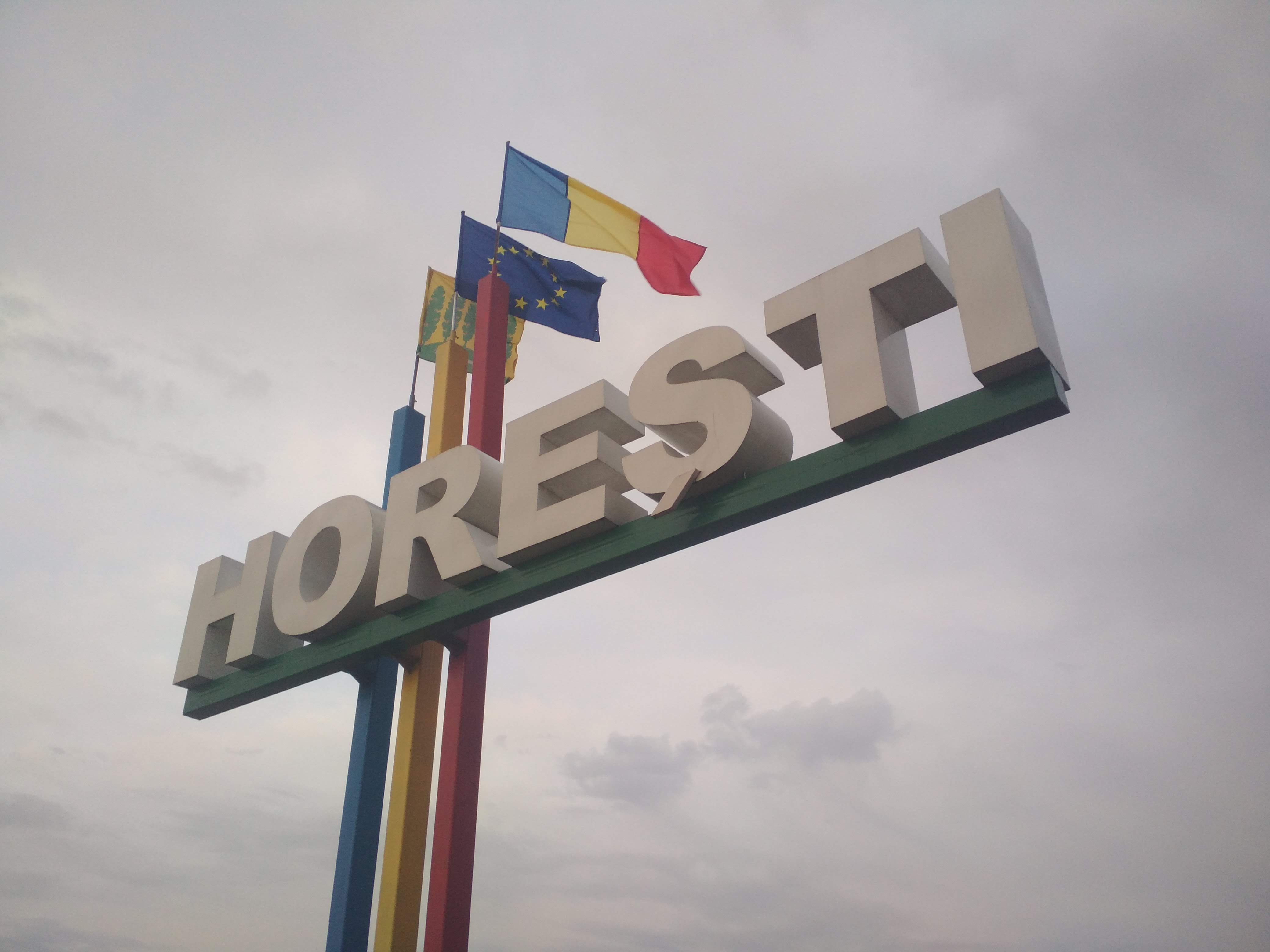 Drapelul românesc de la intrarea în satul Horești a apărut la începutul lunii Martie 2019 și a fost înlocuit de drapelul Republicii Moldova la începutul lunii Iunie 2019.